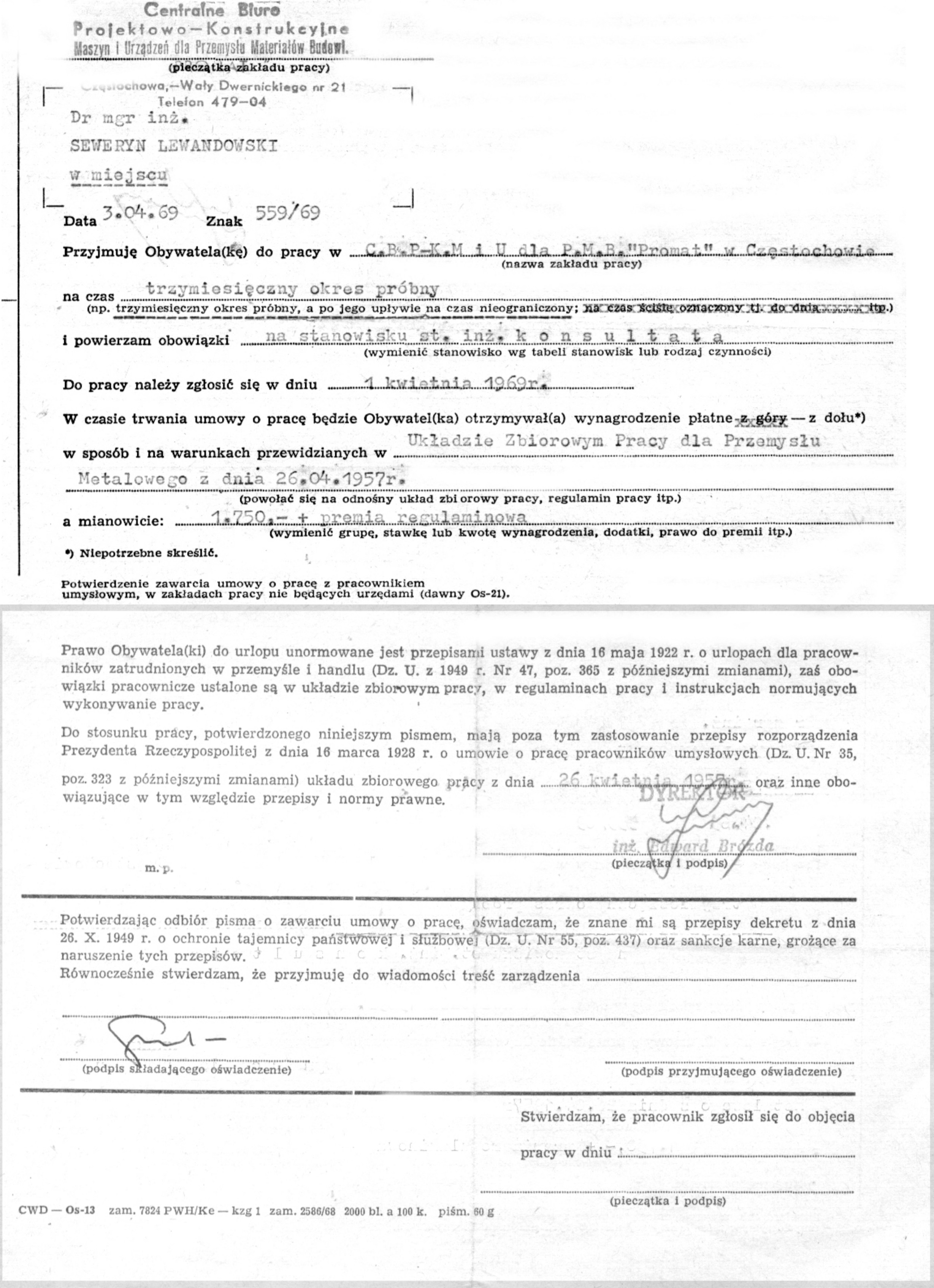 Poświadczenie zatrudnienia w Centralne Biuro Projektowo-Konstrukcyjne Maszyn i Urządzeń dla Przemysłu Maszyn Budowlanych